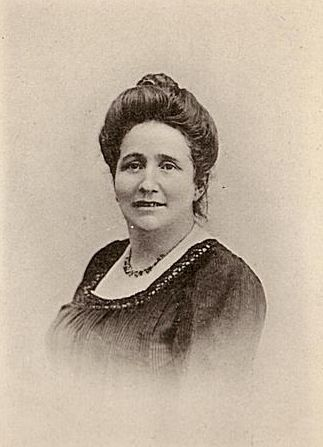 Foto di Ida Baccini, (1850 – 1911), insegnante e scrittrice italiana